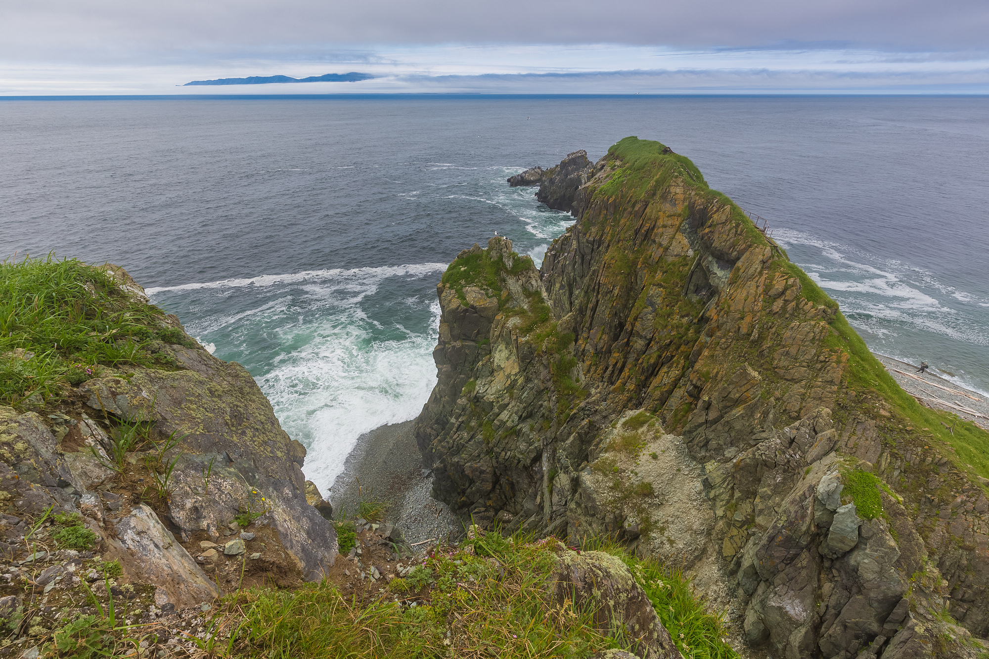 Магаданский заповедник: Ольский район, Магаданская область This image is related to the protected area of Russia number 4900024